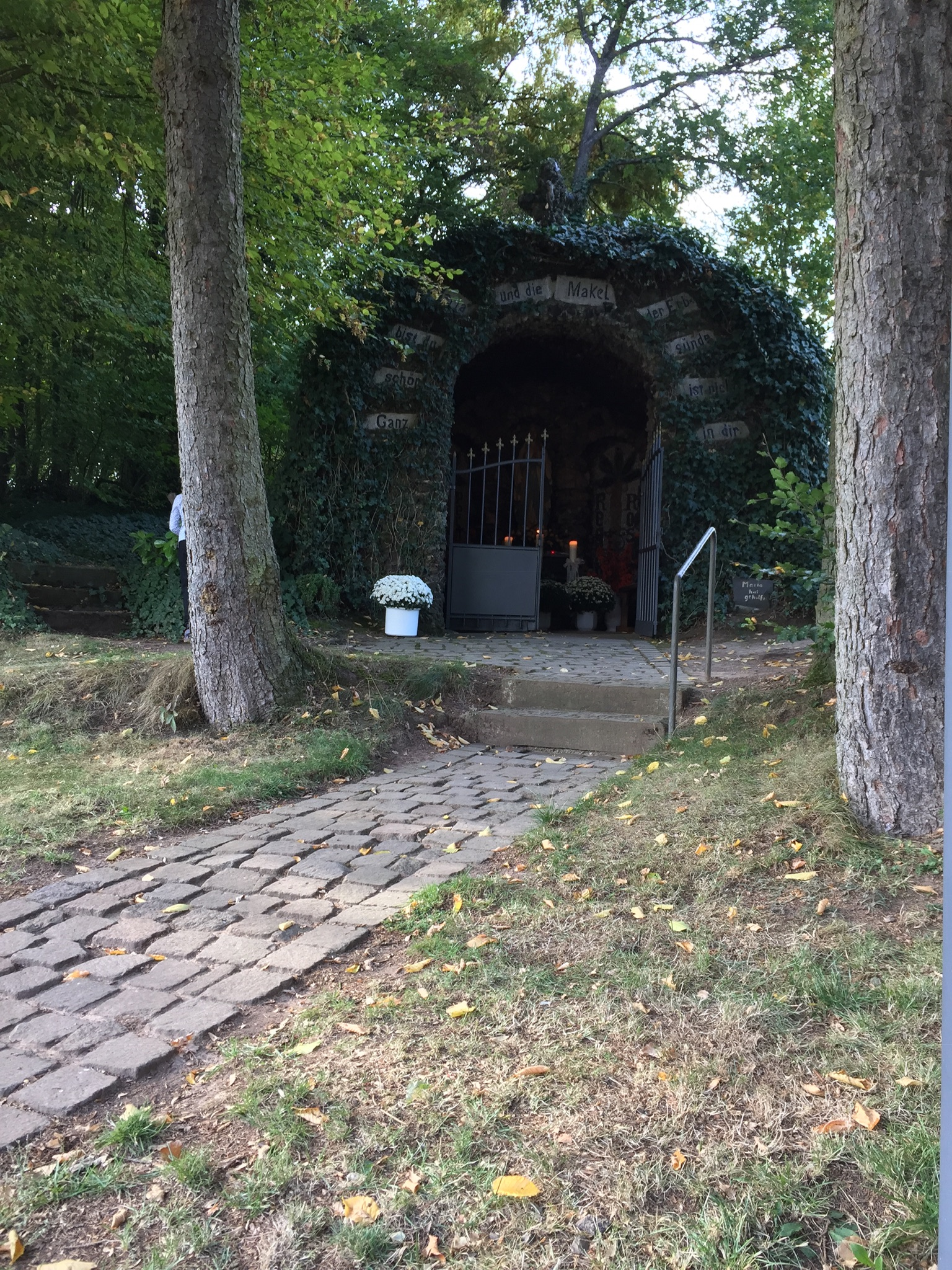 Idyllisch gelegen - ein Ort zum beten und verweilen - die Lourdesgrotte in Beilingen.